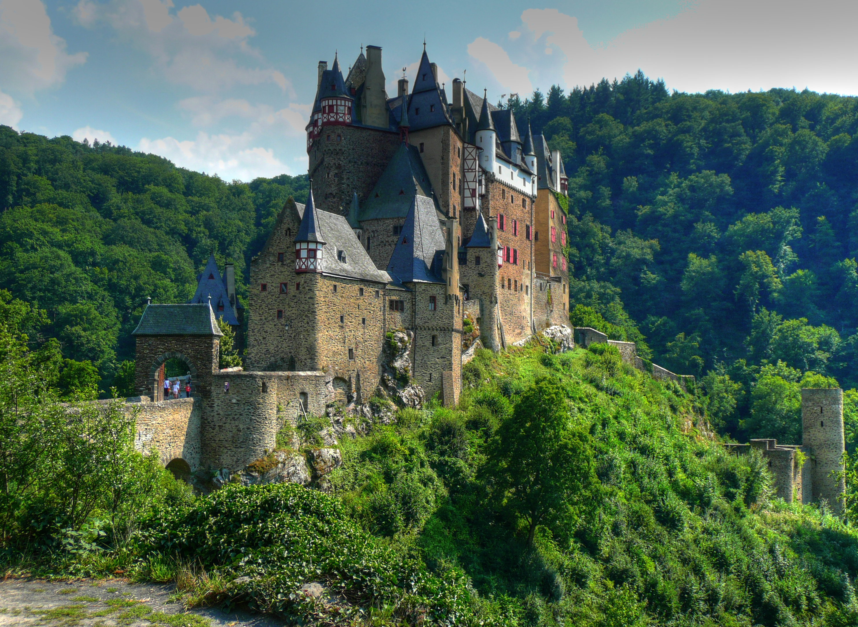 Blick auf Burg Eltz von Nord-Nordwesten; HDR-Foto aus drei digitalen Fotografien